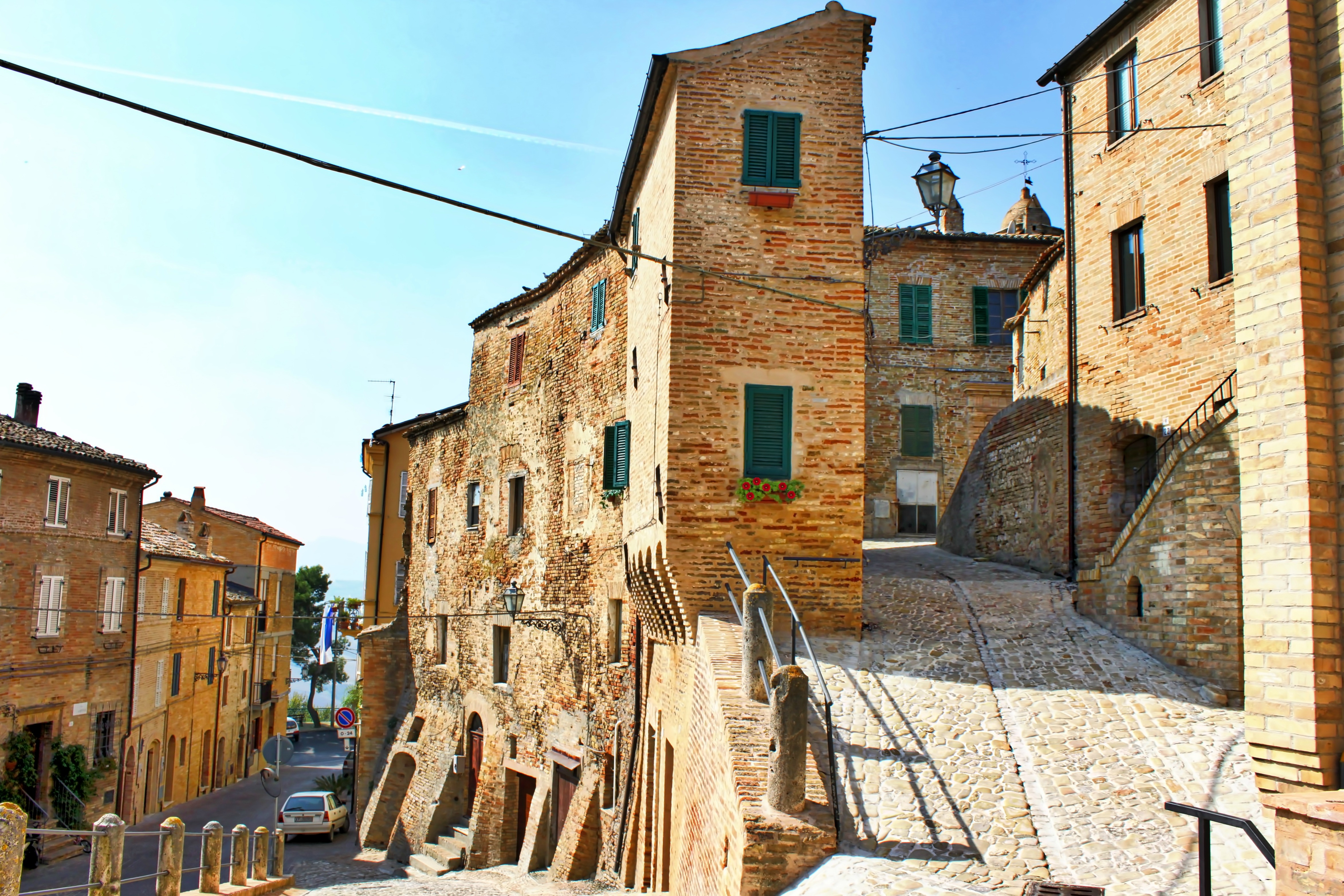 Il Castello Vecchio di Carassai rappresenta l'antico nucleo del paese che rappresenterà più tardi la "Cittadella" in cui arroccarsi, superate le difese del Castello Nuovo. Un tour a piedi è altamente consigliato, sarete immersi in una suggestiva atmosfera medievale con vicoli stretti, case rimaste identiche da secoli e viste panoramiche sulla Valle dell'Aso e del Menocchia